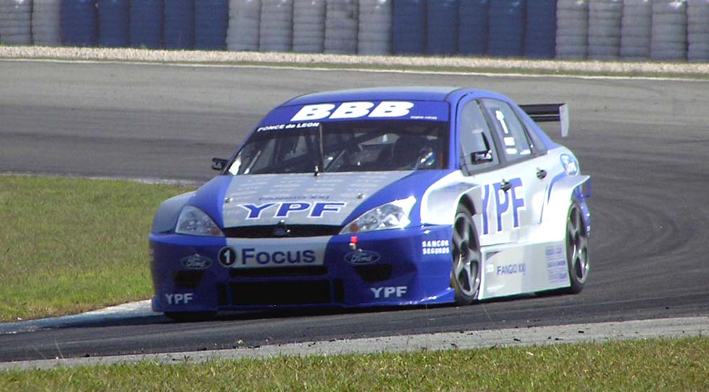 TC2000 team "Ford YPF": Ford Focus#1 Gabriel P. de León